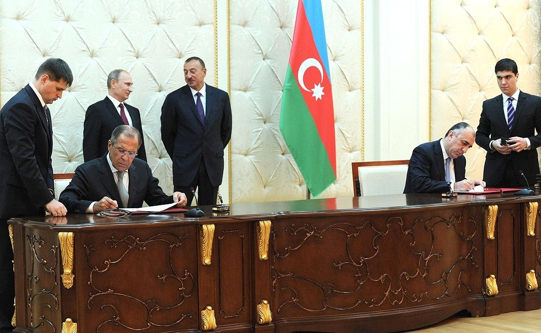 Подписание российско-азербайджанских документов.